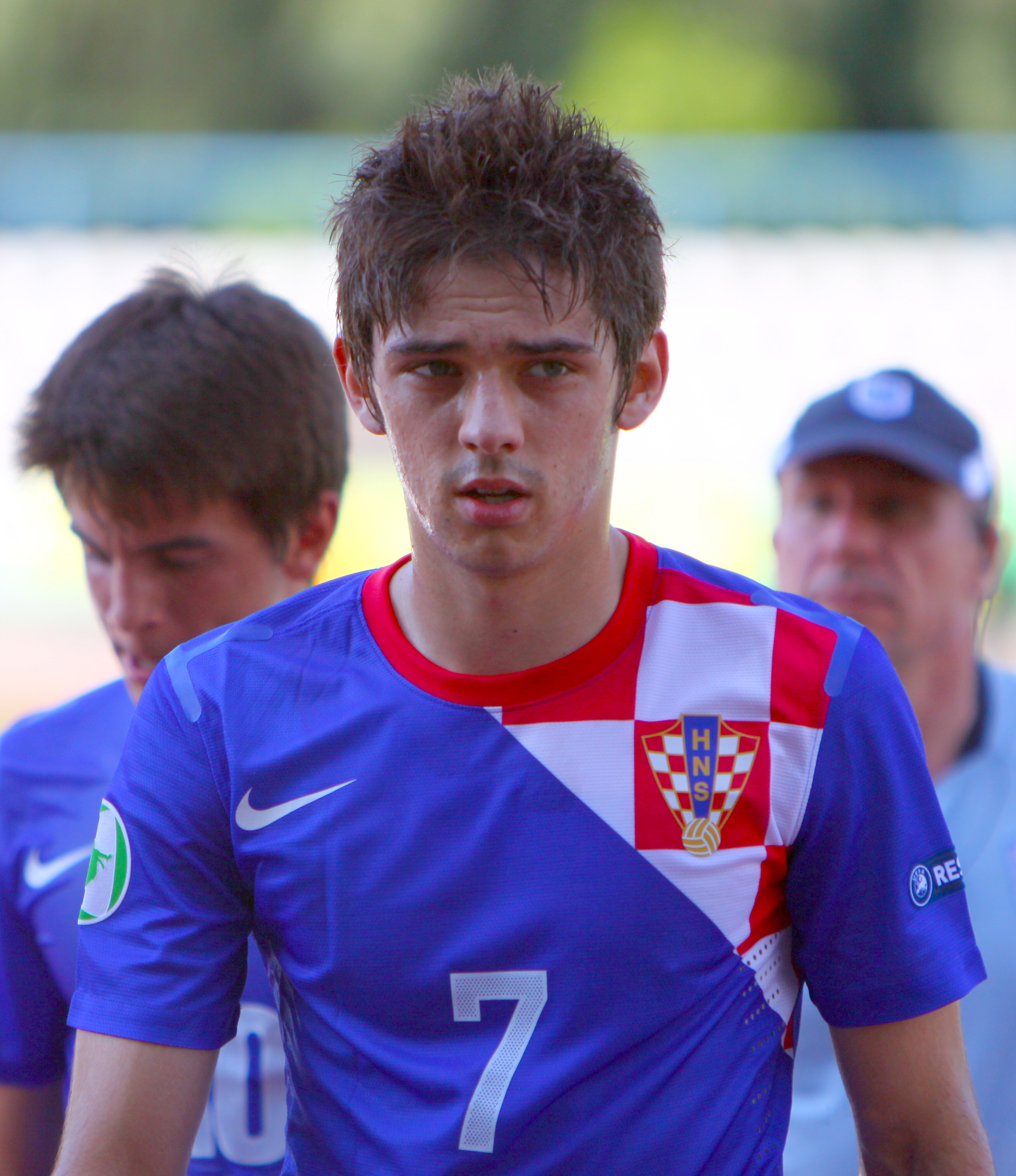 Marko Pajač